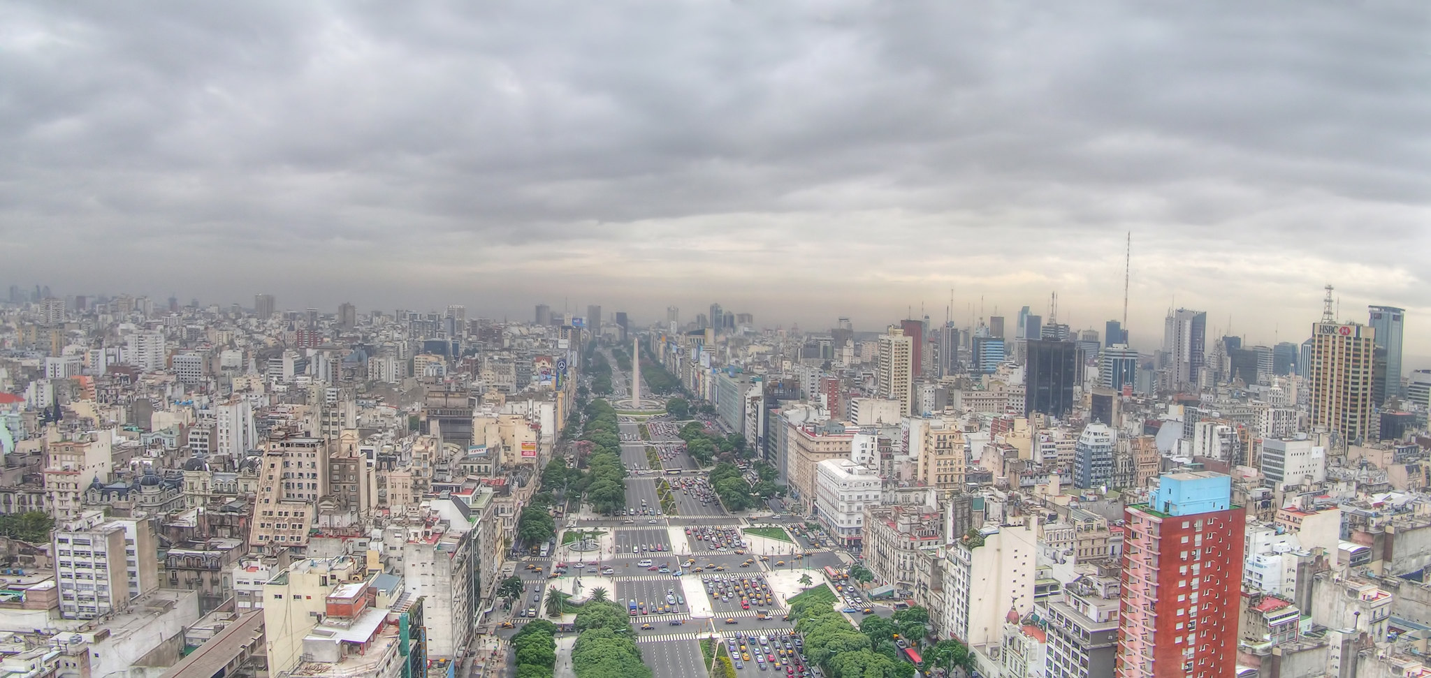 Vista aérea de la Avenida 9 de Julio mirando hacia el esteDesde la terraza (ii)